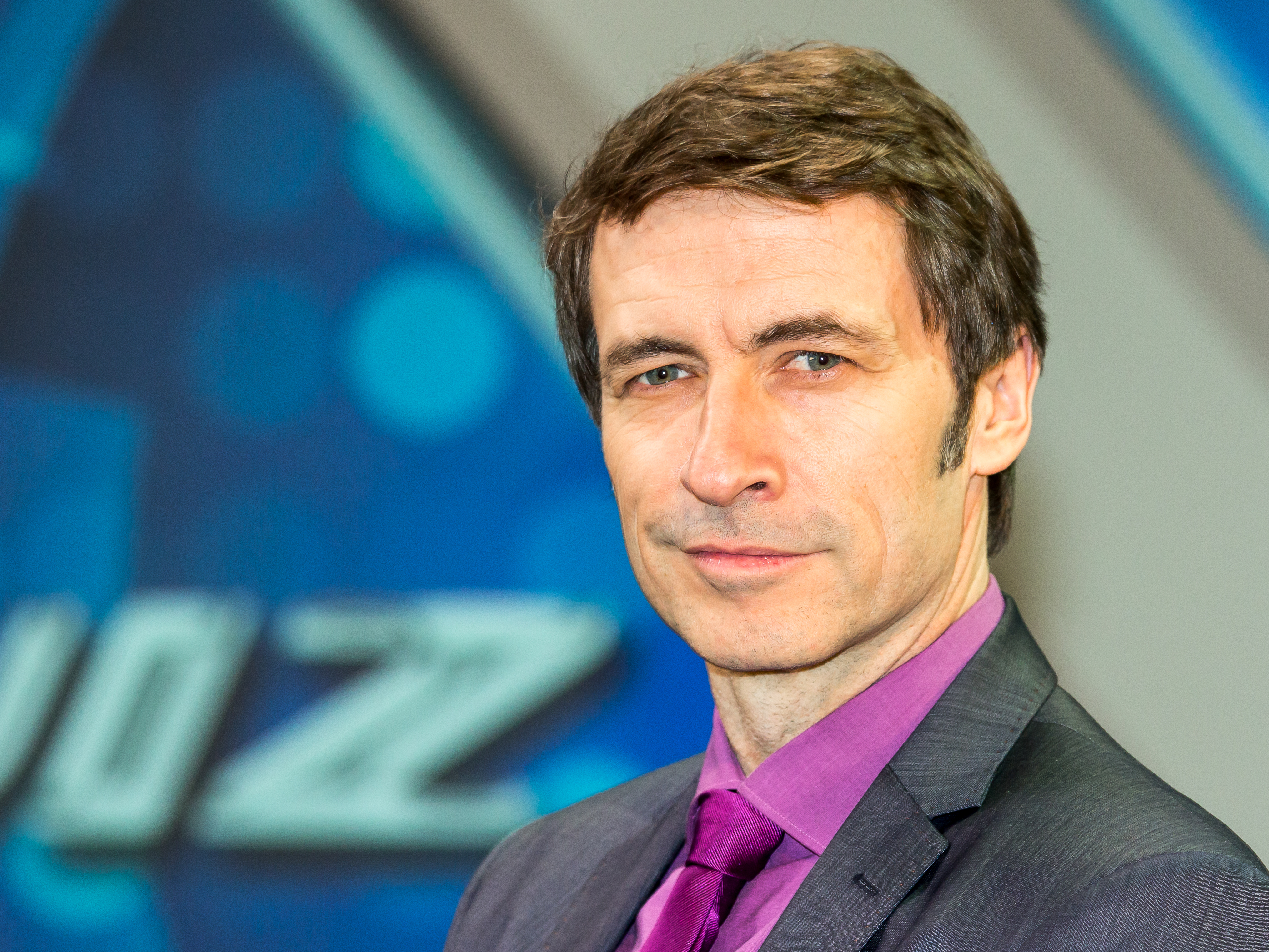 Dreharbeiten zu „Schnitzel geht immer“ (eine Produktion der Bavaria Fernsehproduktion GmbH, Niederlassung Köln (Produzenten Gabriele Graf und Oliver Vogel) im Auftrag des WDR). Pressetermin in der Kulisse der fiktiven Quizsendung „Quizdoppel“. Drehort: Studio auf dem WDR-Gelände Bocklemünd Foto: Guido Broscheit (Rolle: Moderator der Quizshow)